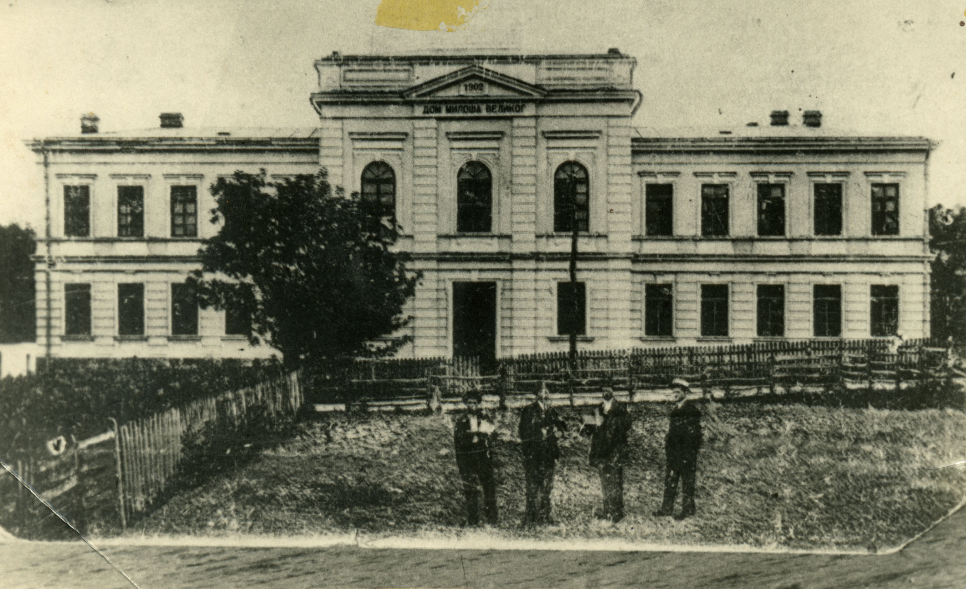 Снимак горњомилановачке гимназије из 1902. године. Аутор непознат.